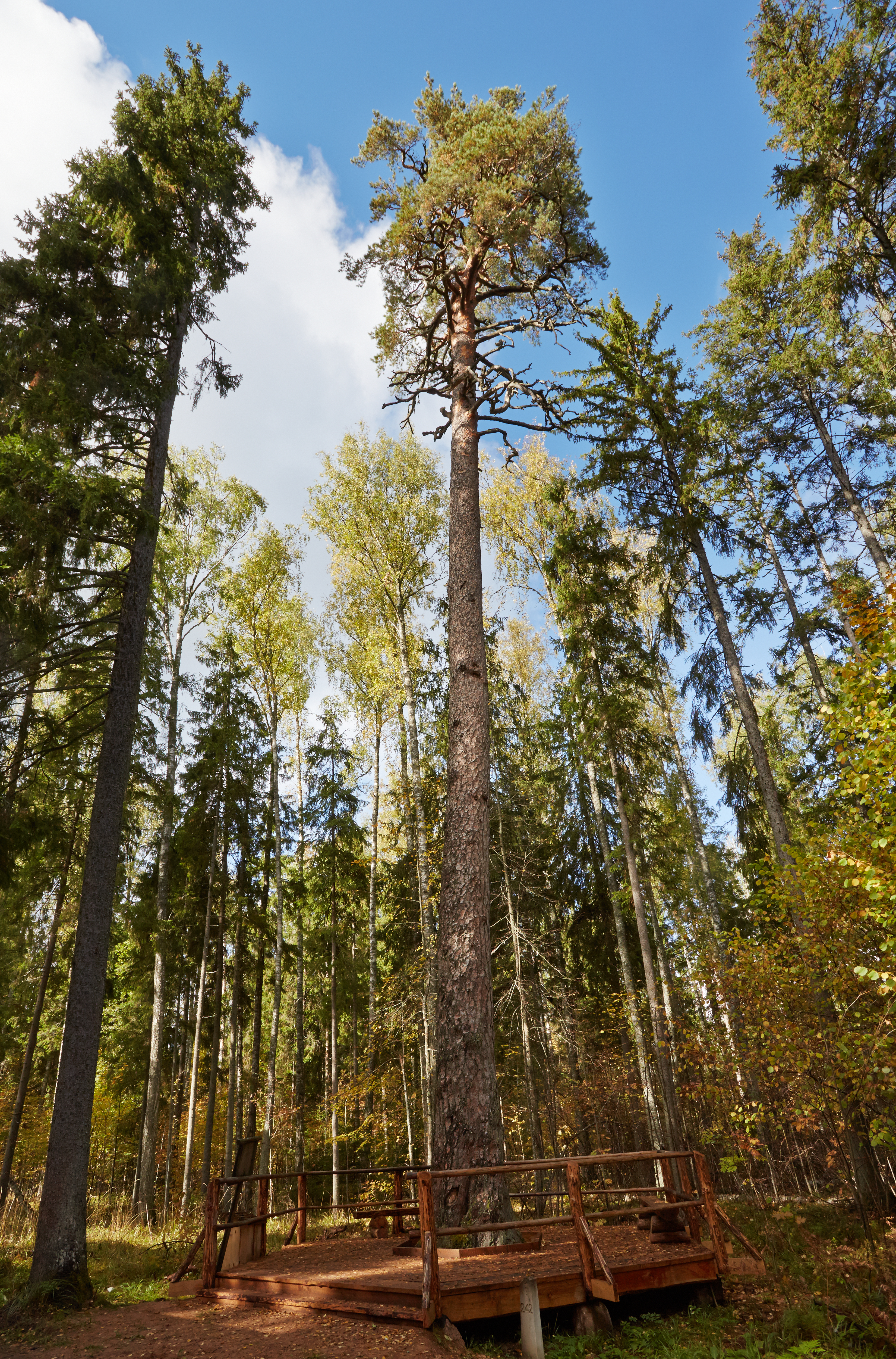 Järvselja Kuningamänd 2013. aasta septembris